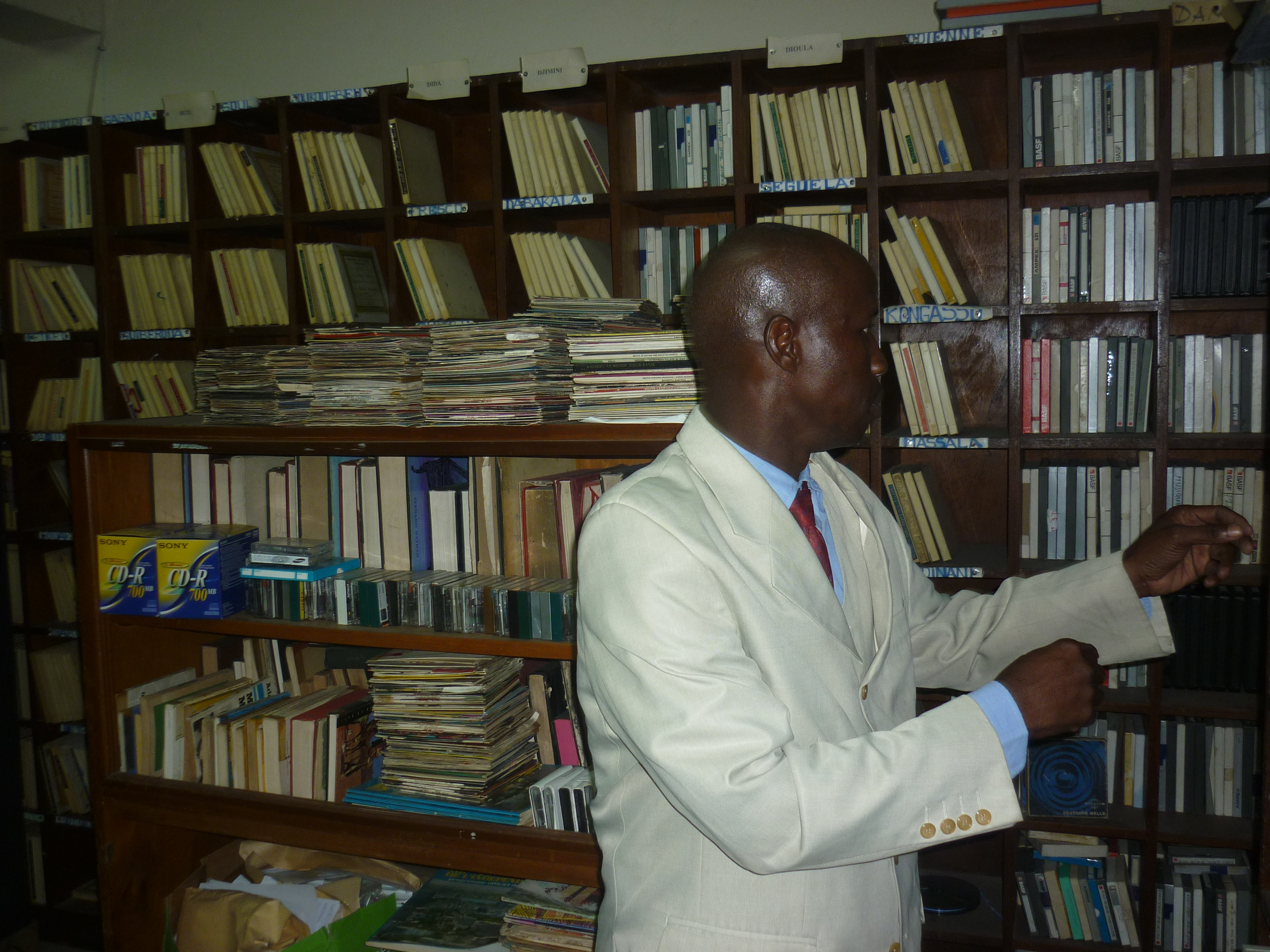 Un bibliothécaire travaillant en Côte d'Ivoire, devant une étagère de livres. This is an image of "African people at work" from Ivory Coast